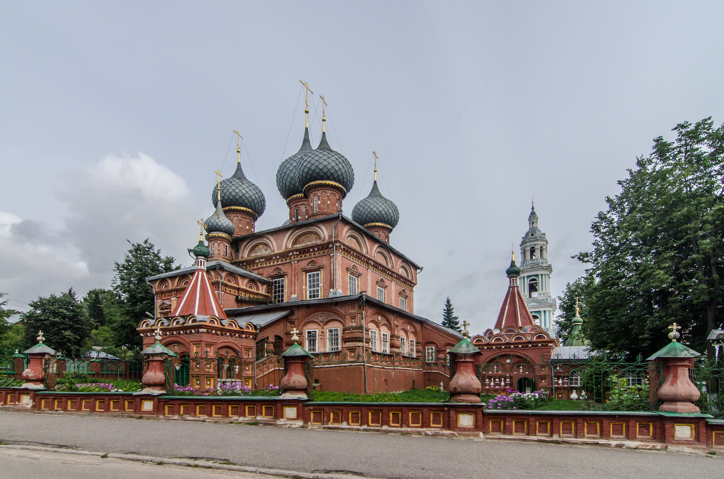 Церковь Воскресения Христова на Дебре: улица Кооперации, 37, Кострома, Костромская область